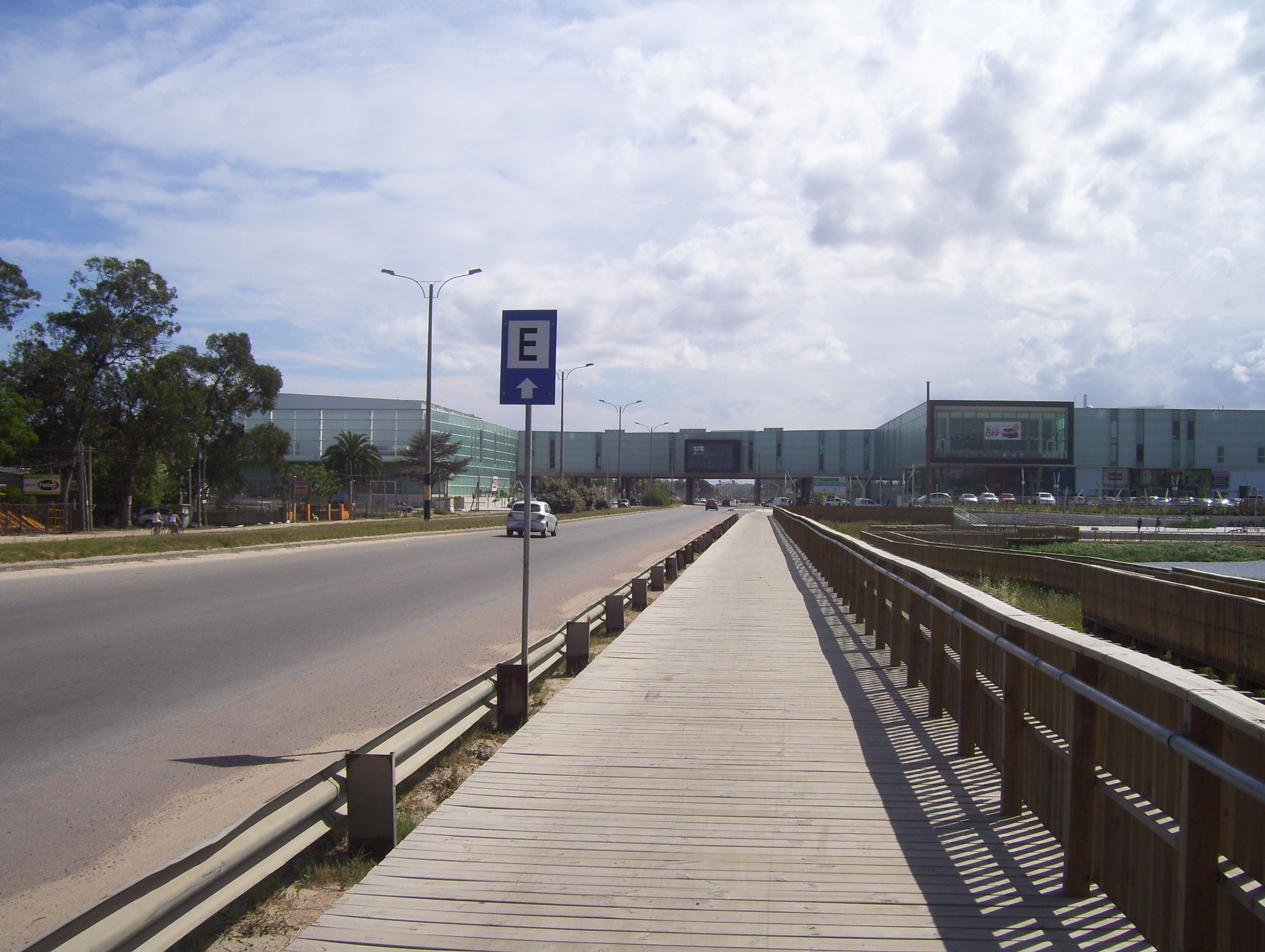 Centro Cívico y Costa Urbana Shopping-Ciudad de la Costa-Uruguay